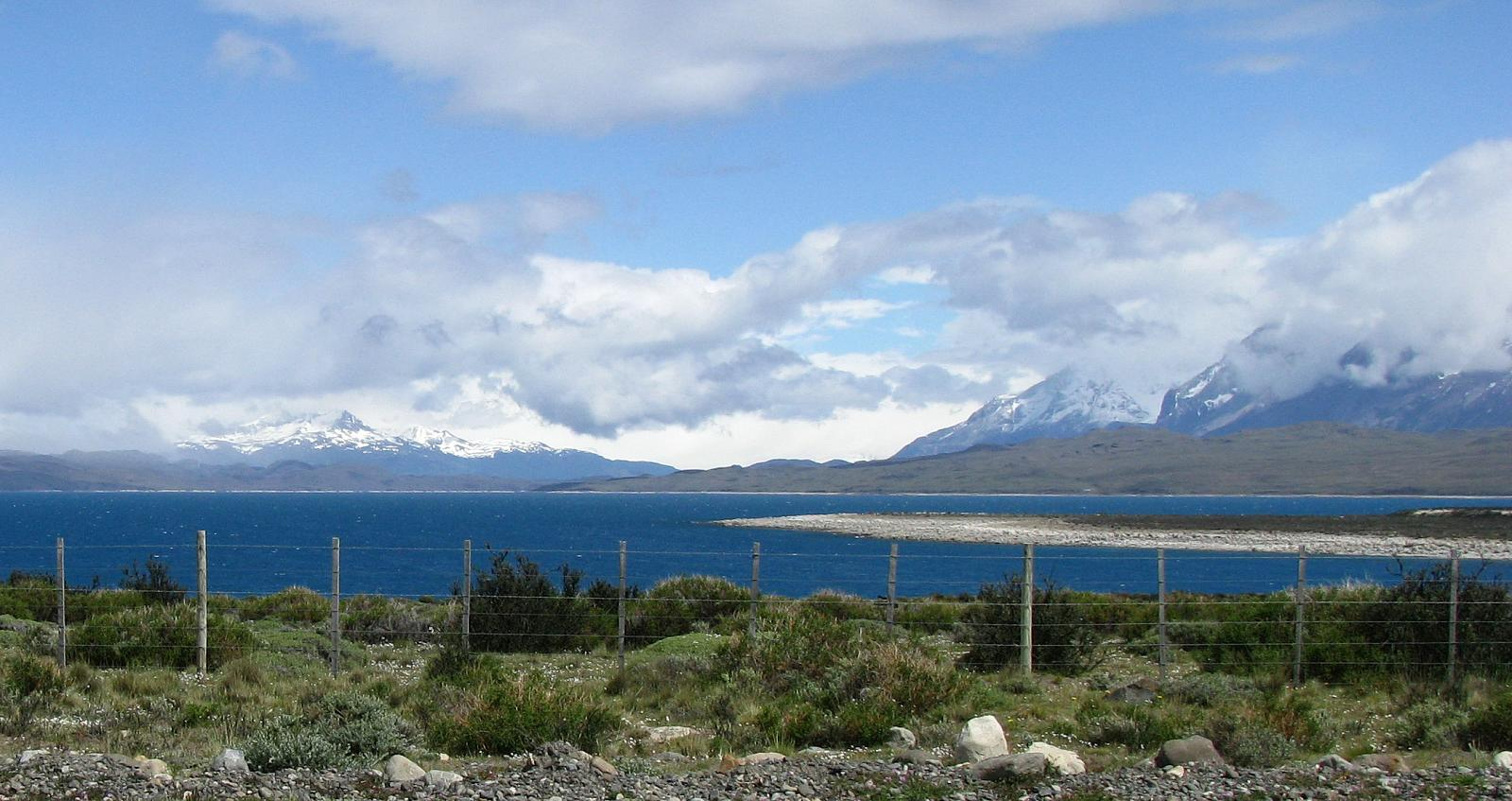 Lago Sarmiento, Chile